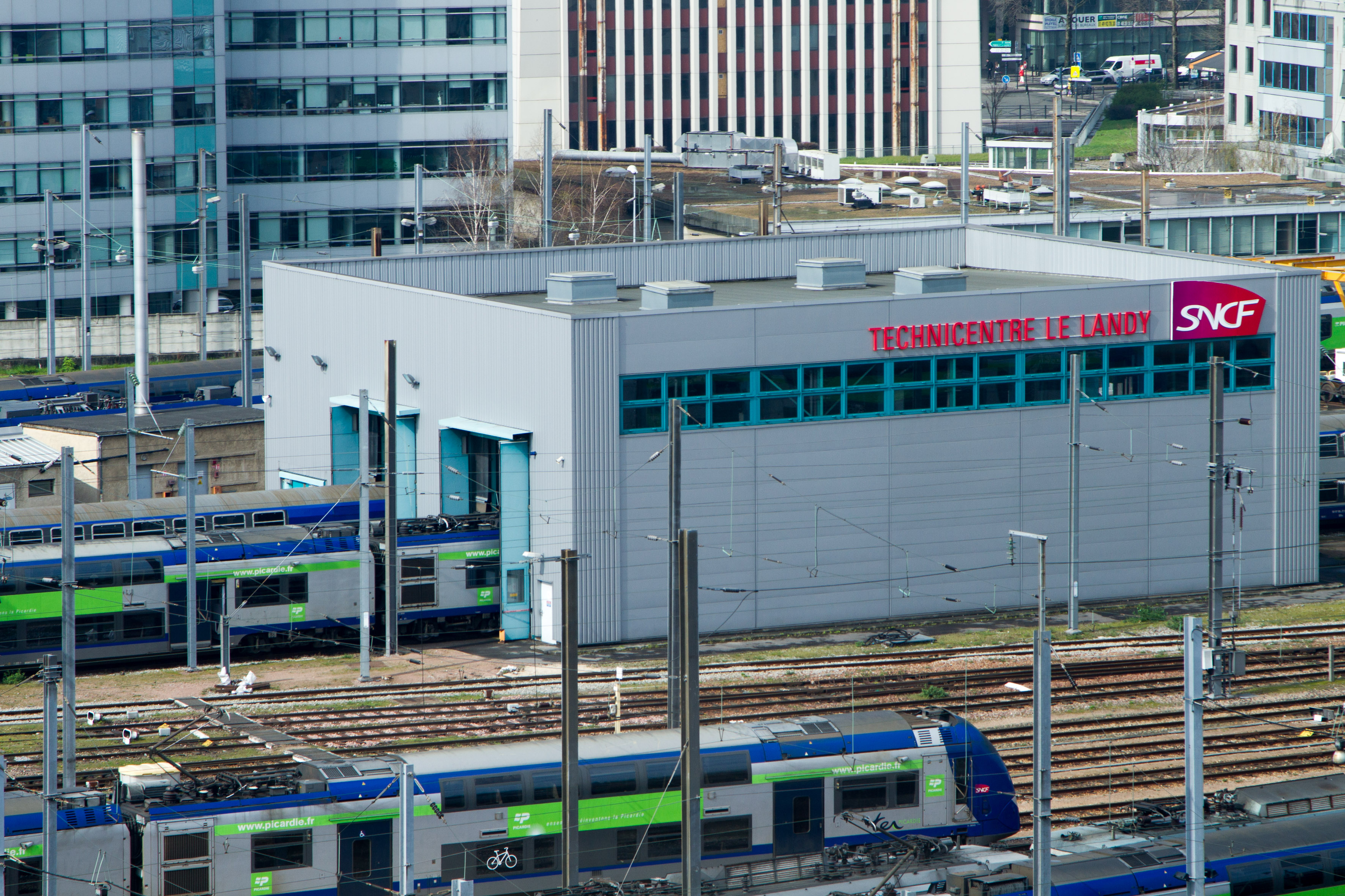 Le Technicentre du Landy vu depuis le siège de la SNCF.